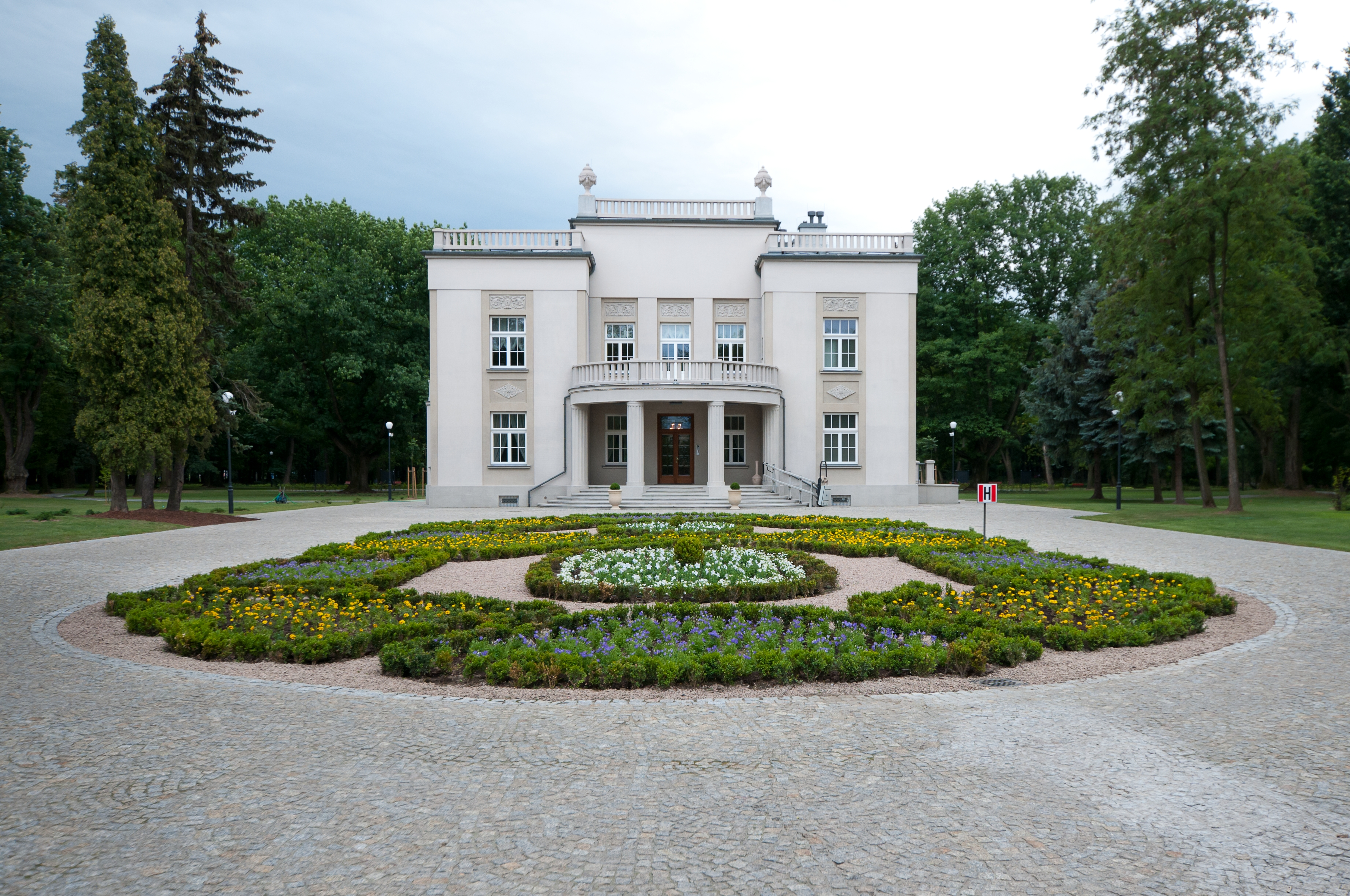 Tarnów, ul. Jarzębinowa 9 - zespół willowy: widok na Pałacyk Kwiatkowskiego (willę) od strony północnej. Widoczna strona frontowa wraz z klombem i otaczającym pałacyk Parkiem im. E. Kwiatkowskiego (zabytek nr A-63/M z 21.07.2006)